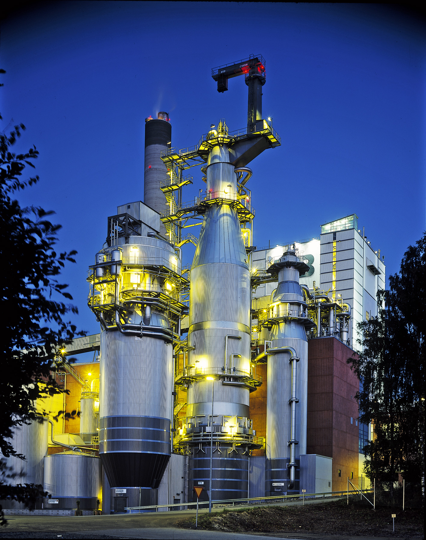 Typisk silhouett av en Kamyr Kokare